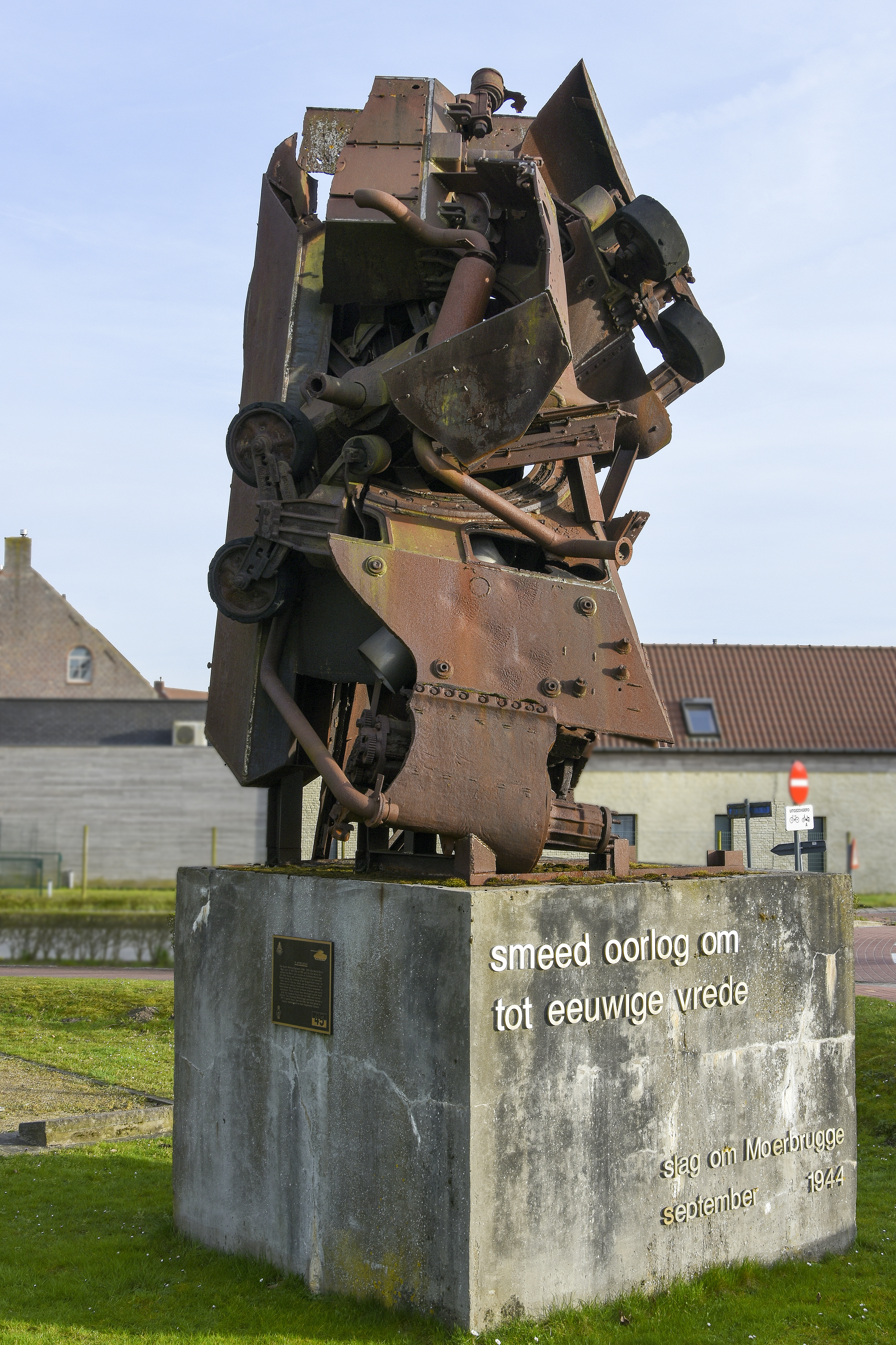 Tankmonument te Moerbrugge, België